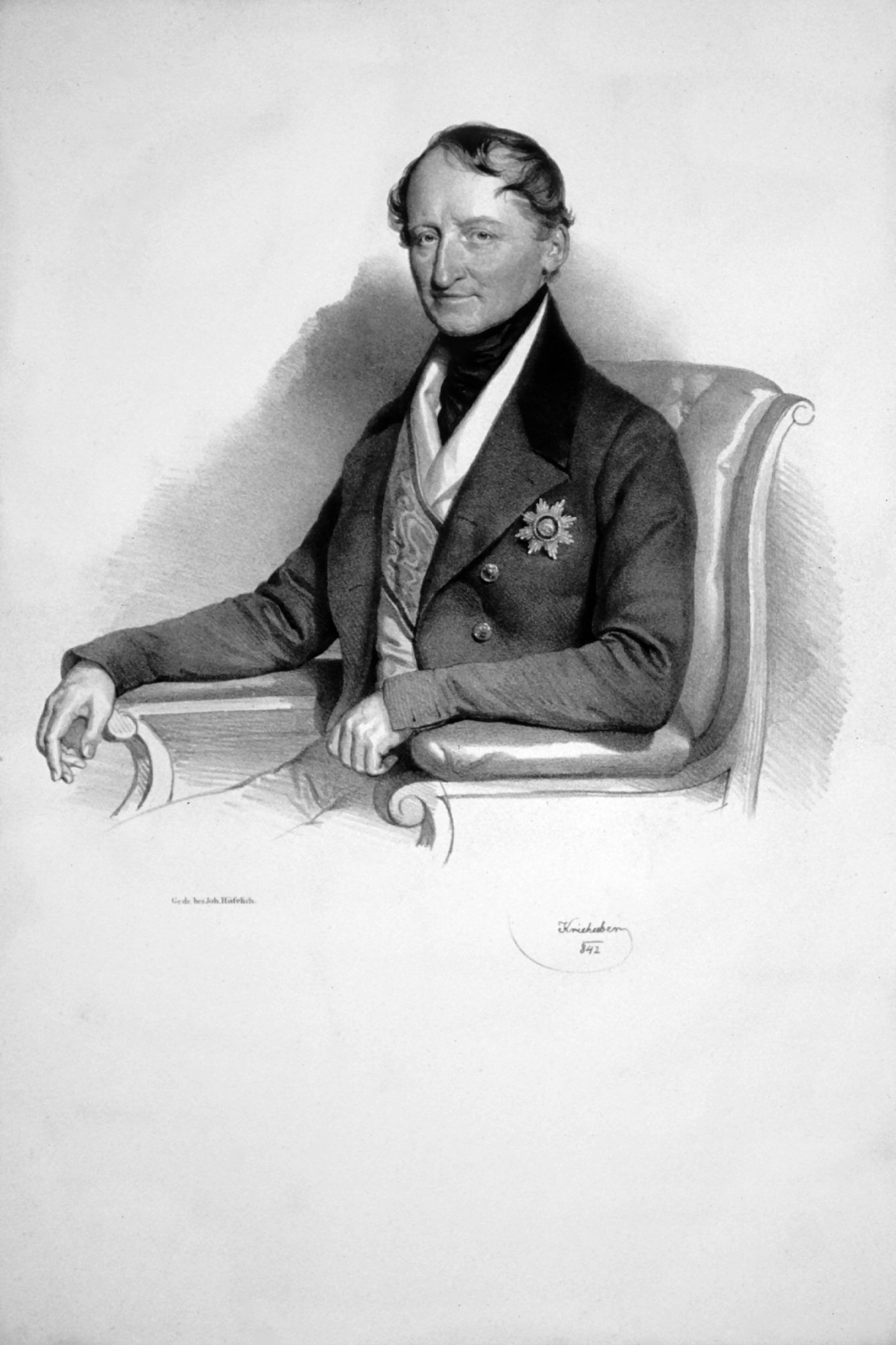 Friedrich Graf Wilczek (1790-1861) Landeshauptmann von Tirol. Zweiter Hofkammerpräsident in Wien, Präsident der General-Rechnungsdirektion, Großkreuz des Ordens der Eisernen Krone, und des Leopoldordens.